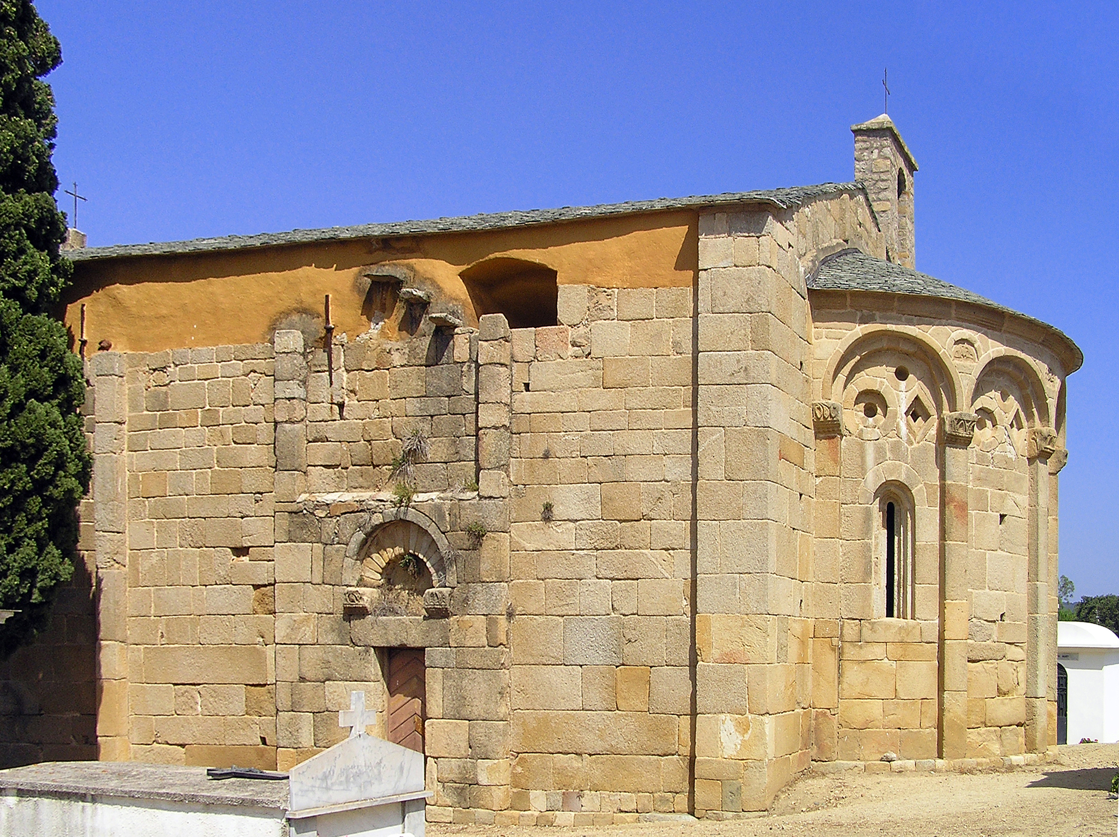 Corsu: Lumiu (Corsica) - A parte meridiunale di a cappella San Pietro è San Paolo